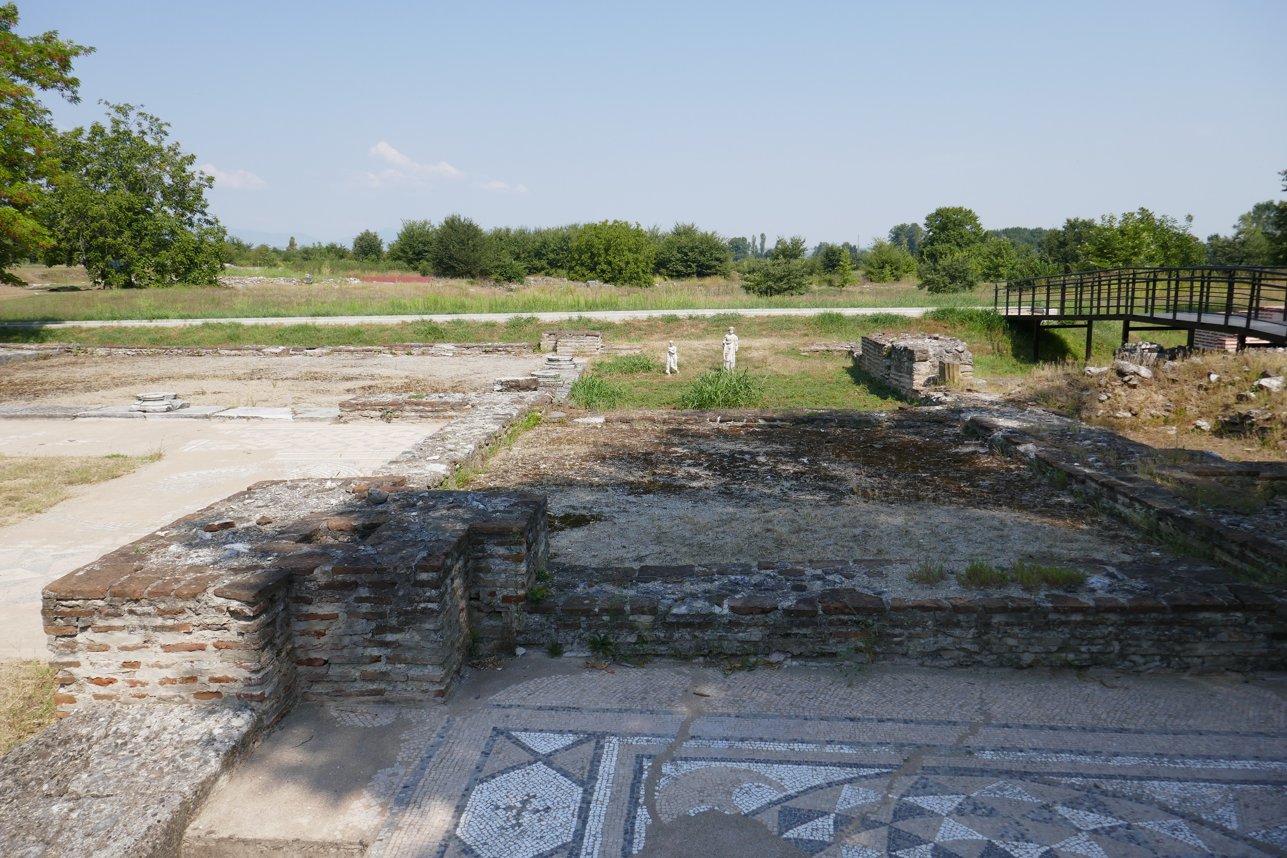 ディオン遺跡の居住跡